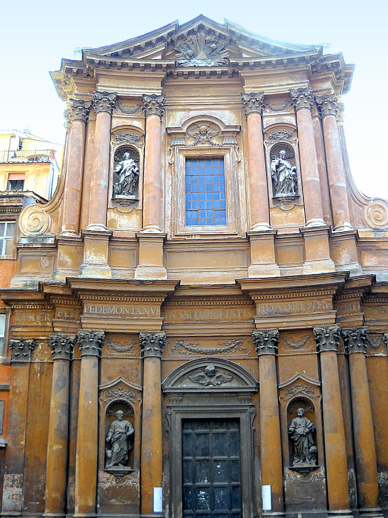 Chiesa della Santissima Trinità dei Pellegrini